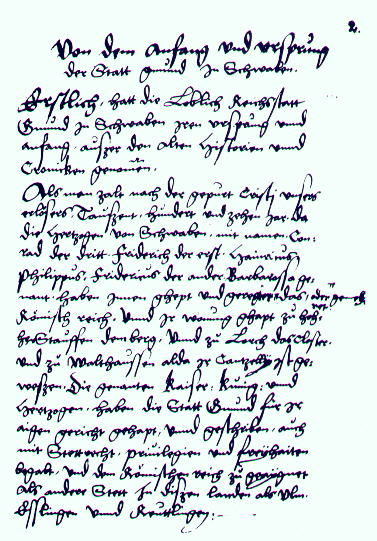 Autograph der „Gmünder Chronik“ (Schwäbisch Gmünd) von Paul Goldstainer, geschrieben 1549/1550